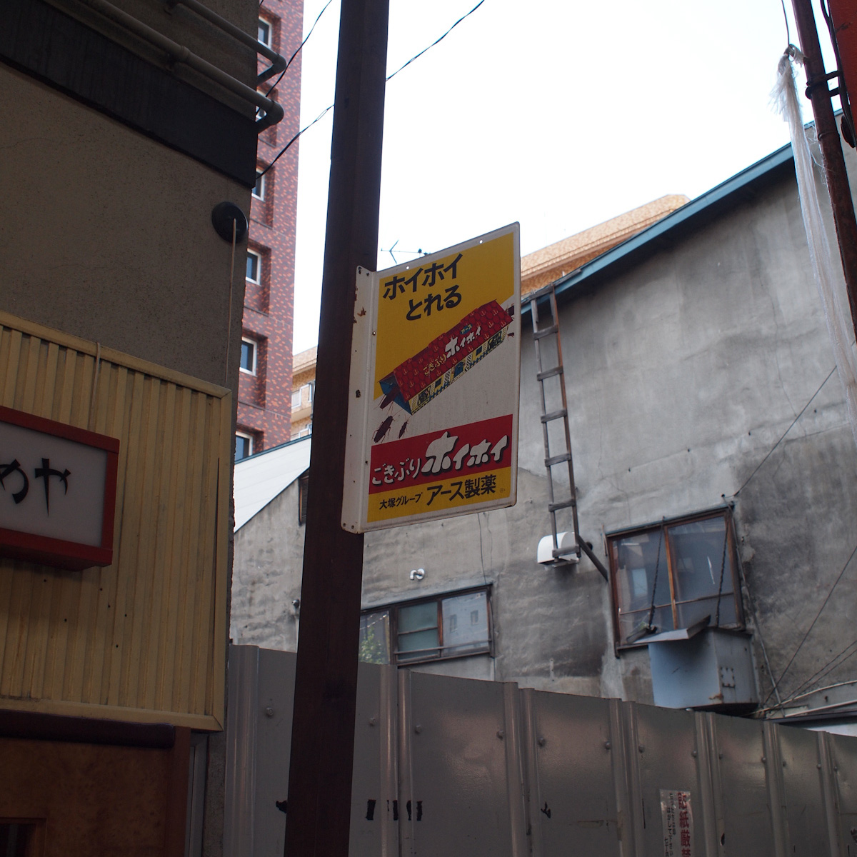 これは７丁目 狸小路 / ごきぶりホイホイ [1]